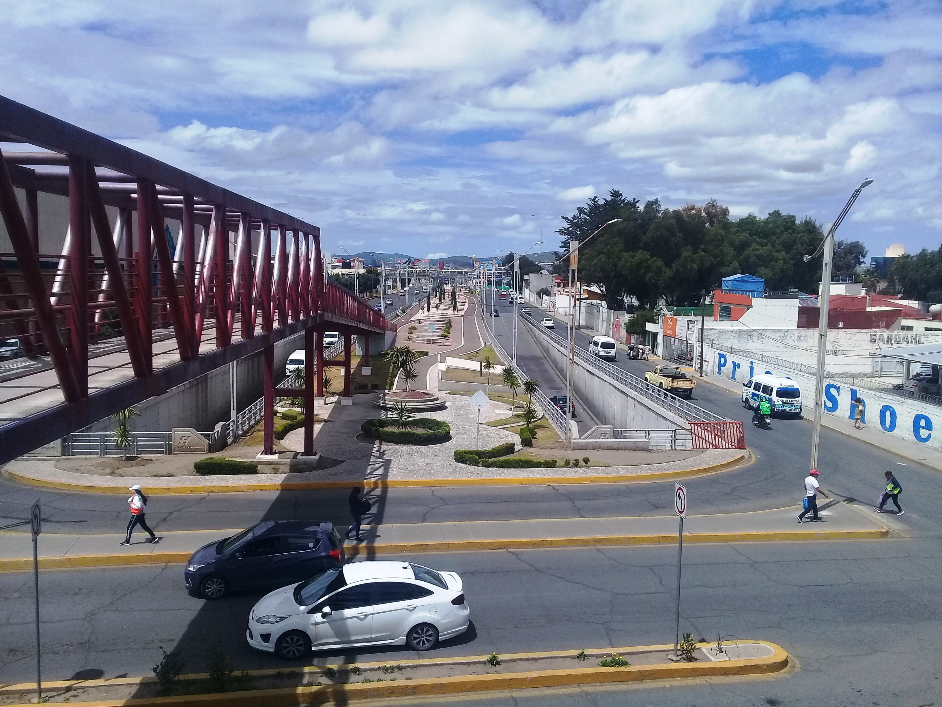 Río de las Avenidas en Pachuca, México.